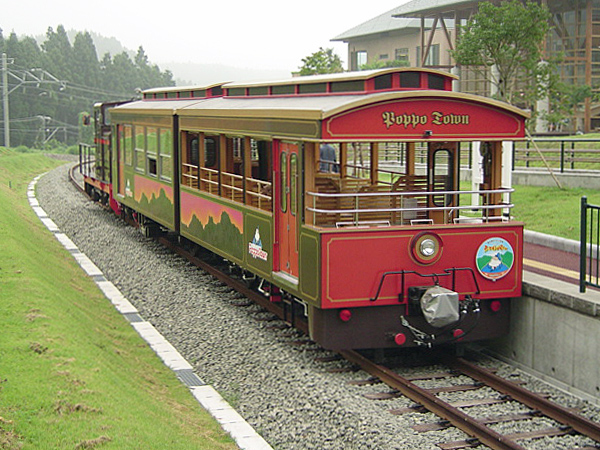 碓氷峠鉄道文化むらのトロッコ列車「シェルパ君」